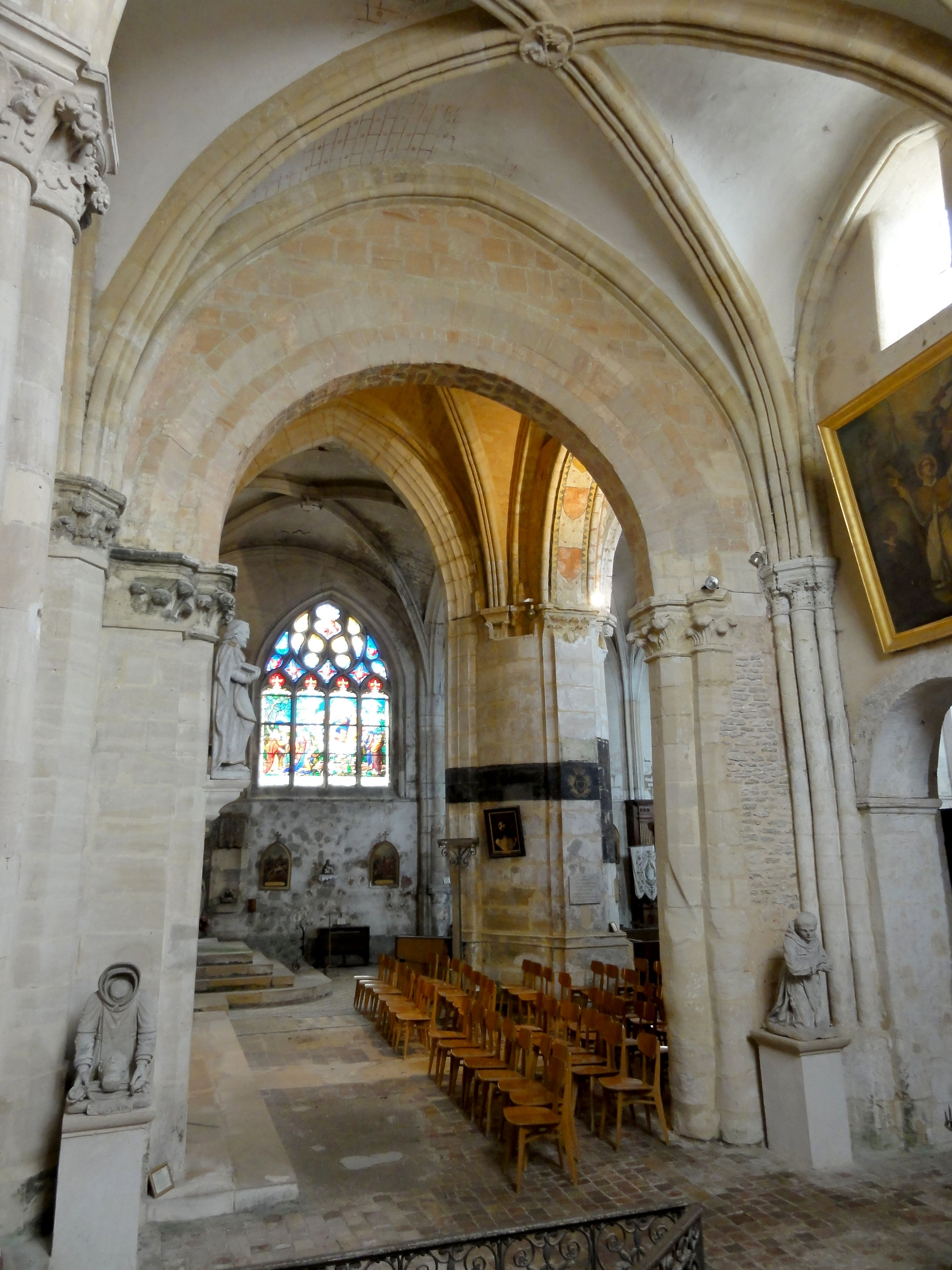 Croisillon nord, vue vers le sud.